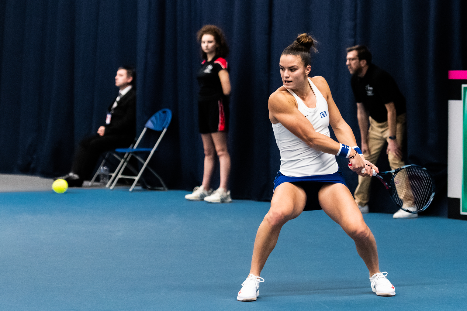 Maria Sakkari